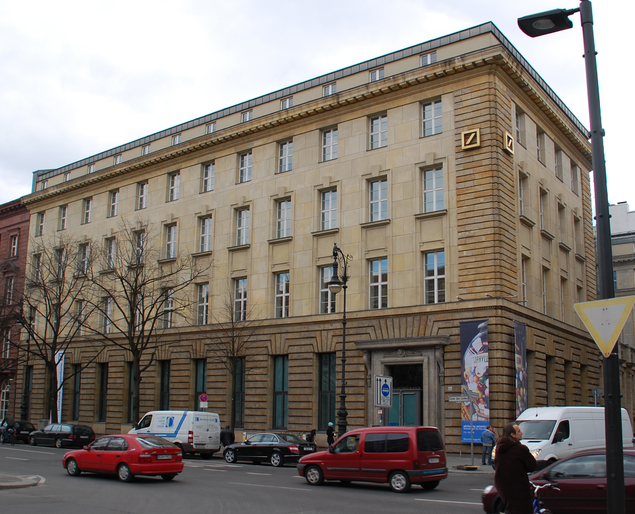 Deutsche Guggenheim in Berlin, Germany